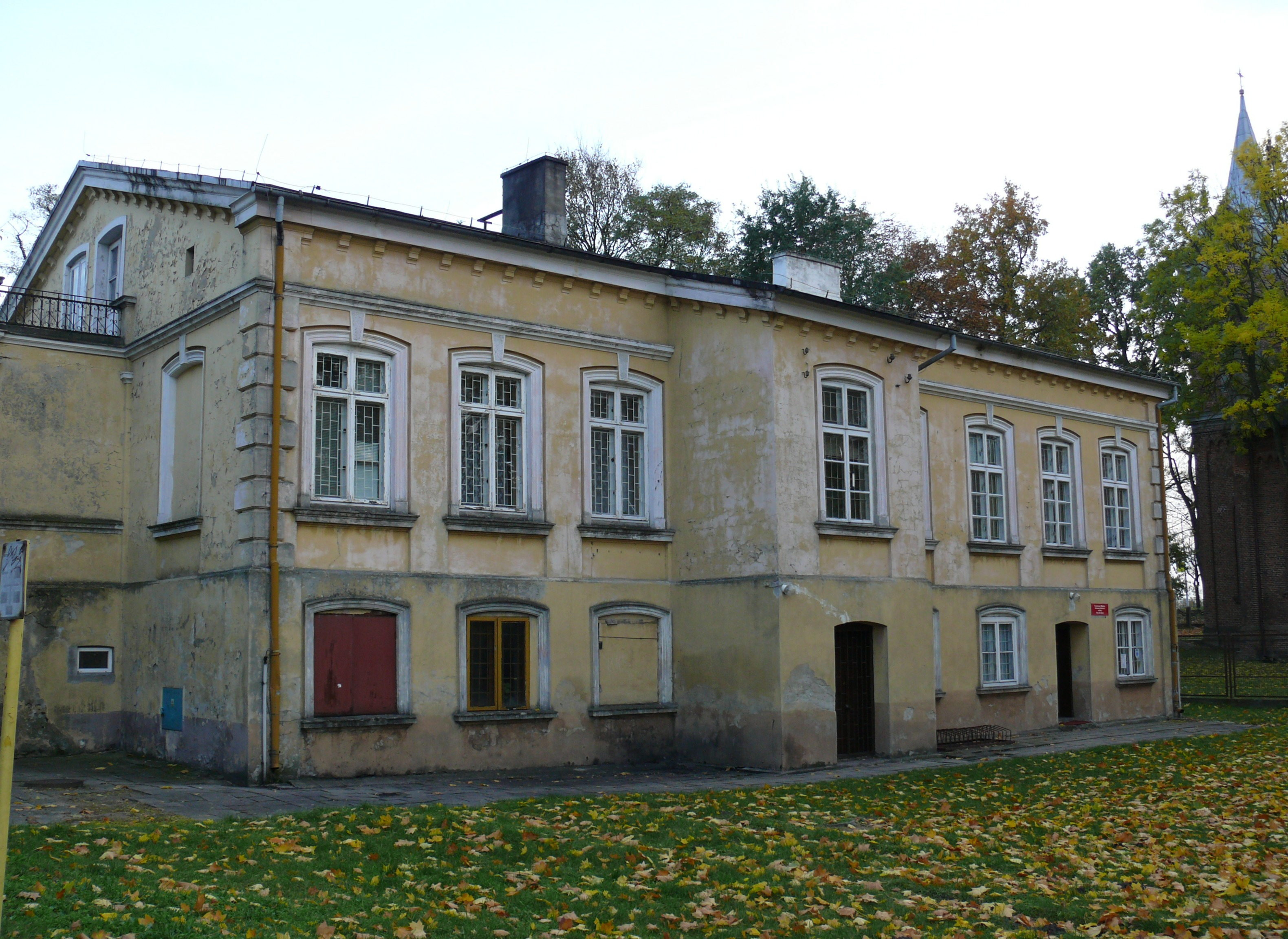 Gmach Miejskiej i Powiatowej Biblioteki Publicznej w Kole - budynek dawnej pastorówki parafii ewangelickiej.